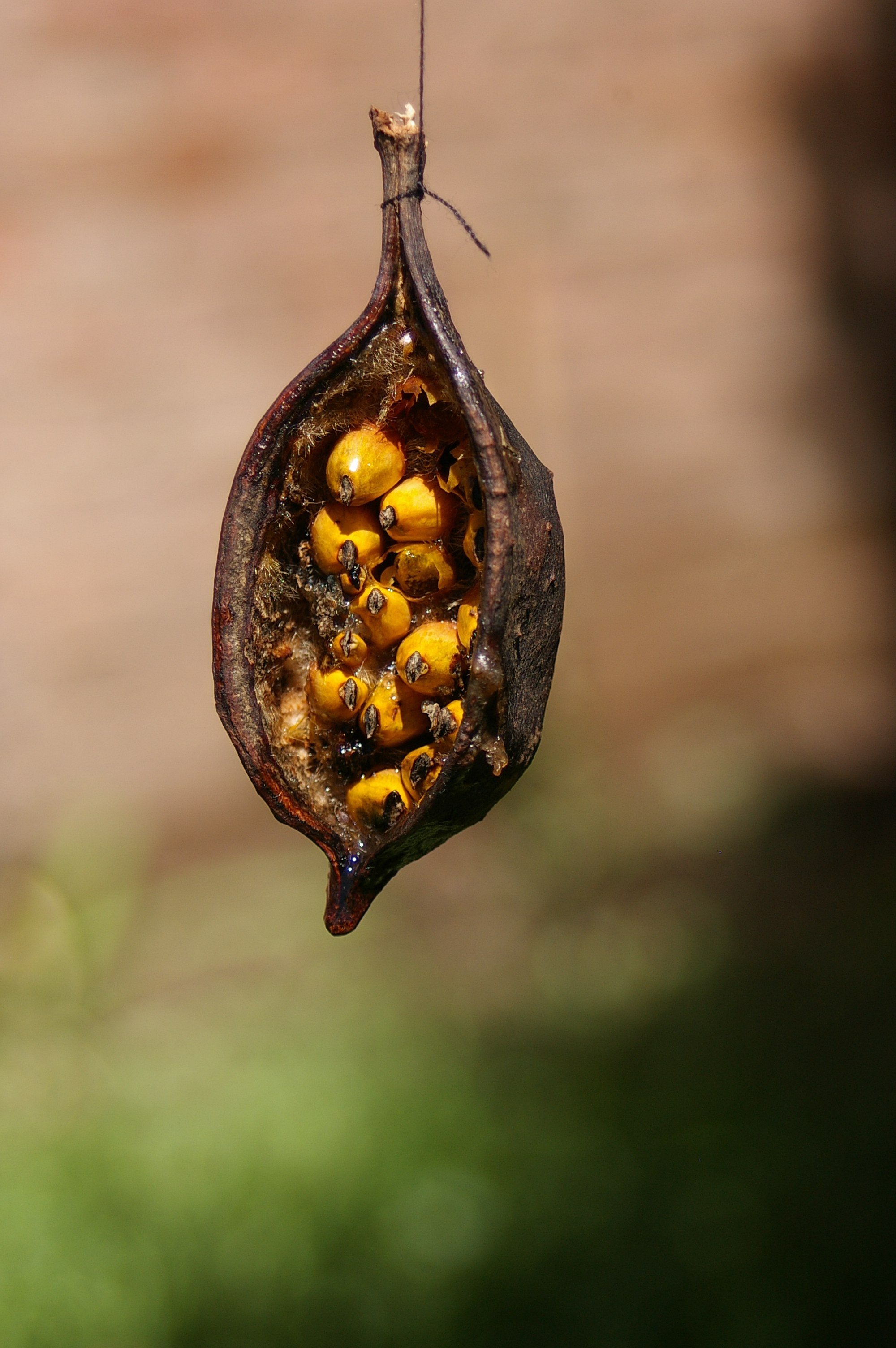 Fruto del Brachychiton Populneos